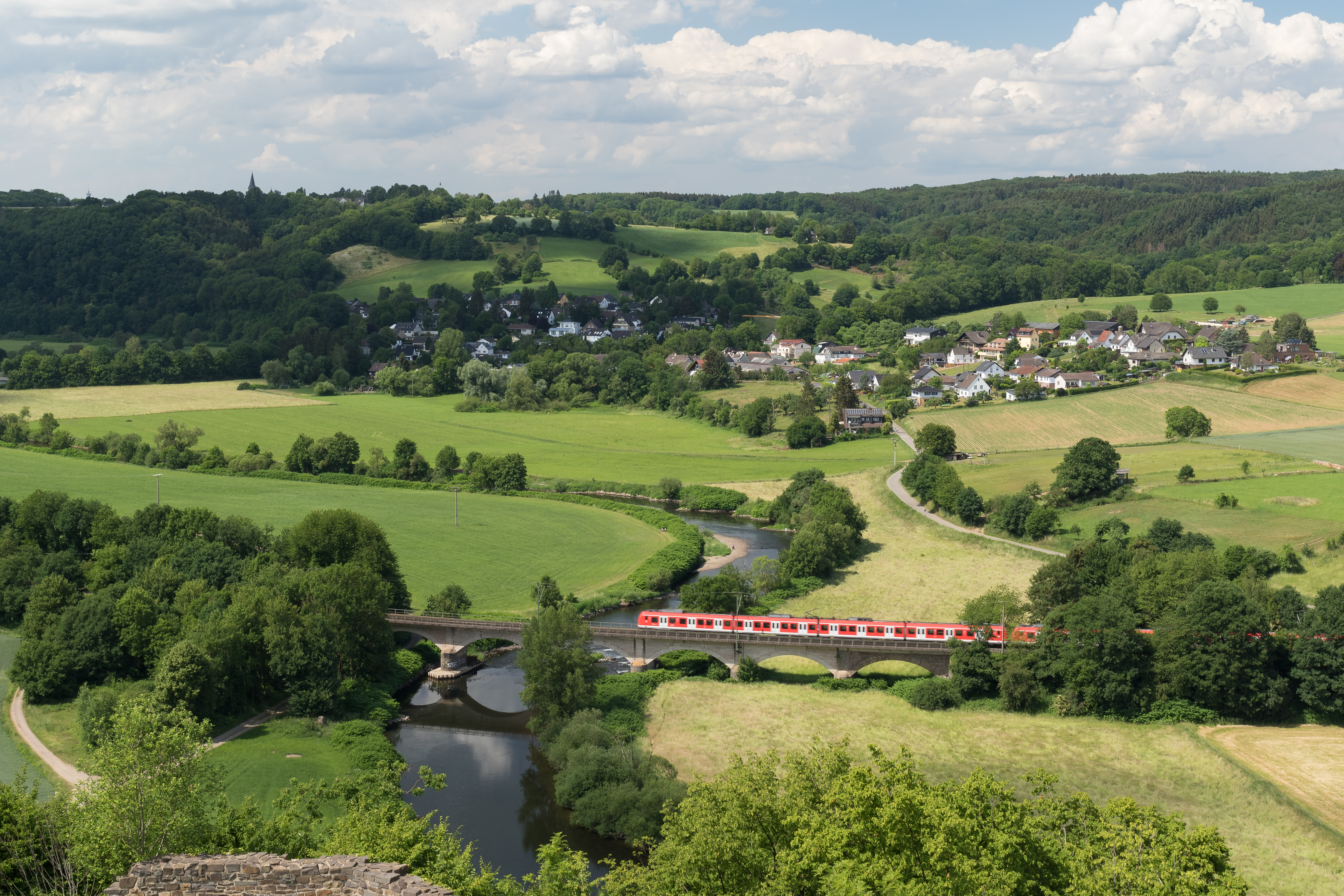 Naturschutzgebiet Siegauen bei 53773 Hennef-Stein